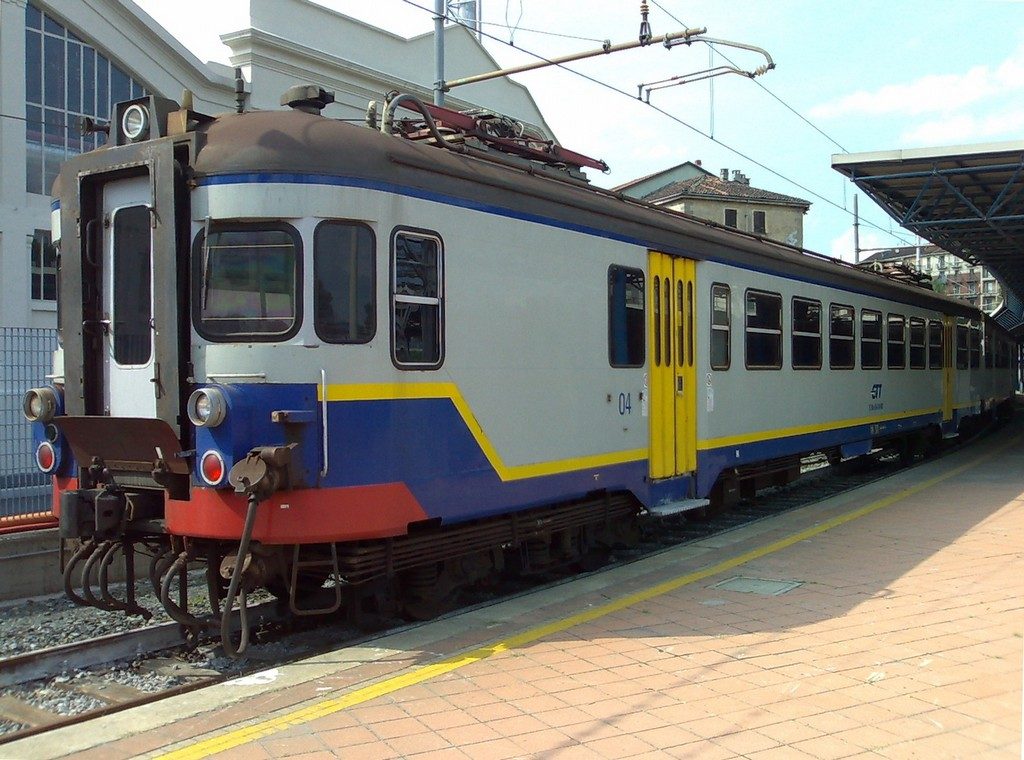 Ale 054 "Belga" ripresa alla Stazione Torino Dora GTT; alle spalle le ex Officine di Savigliano